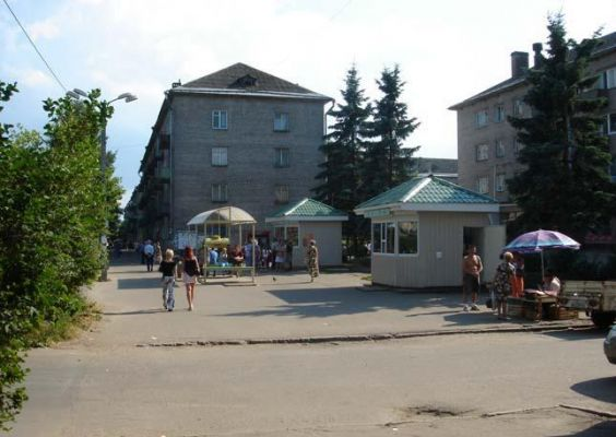 В целом город Волхов приземист и уютен